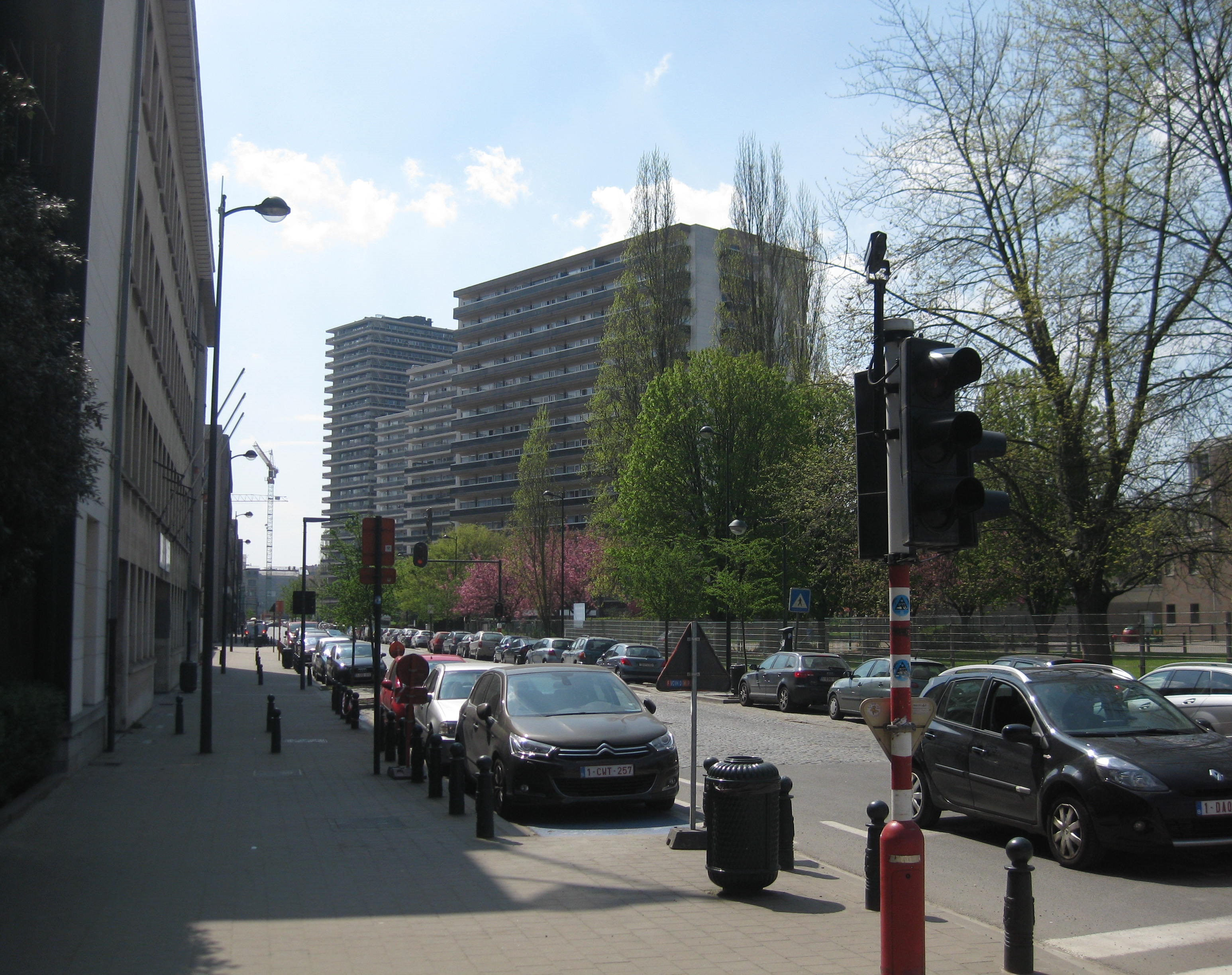 Avenue de l'Héliport, à droite se trouvait l'héliport de Bruxelles-Allée-Verte.